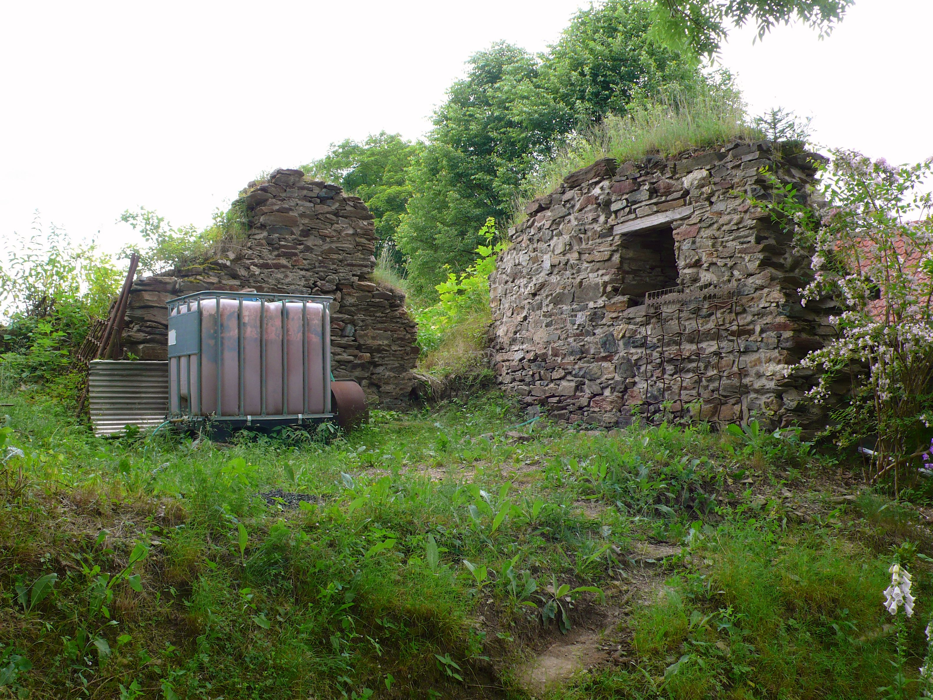 Zbytky zdiva parkánové hradby